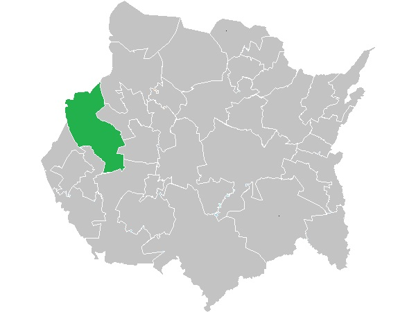 ubicacion de miacatlan en el estado de morelos